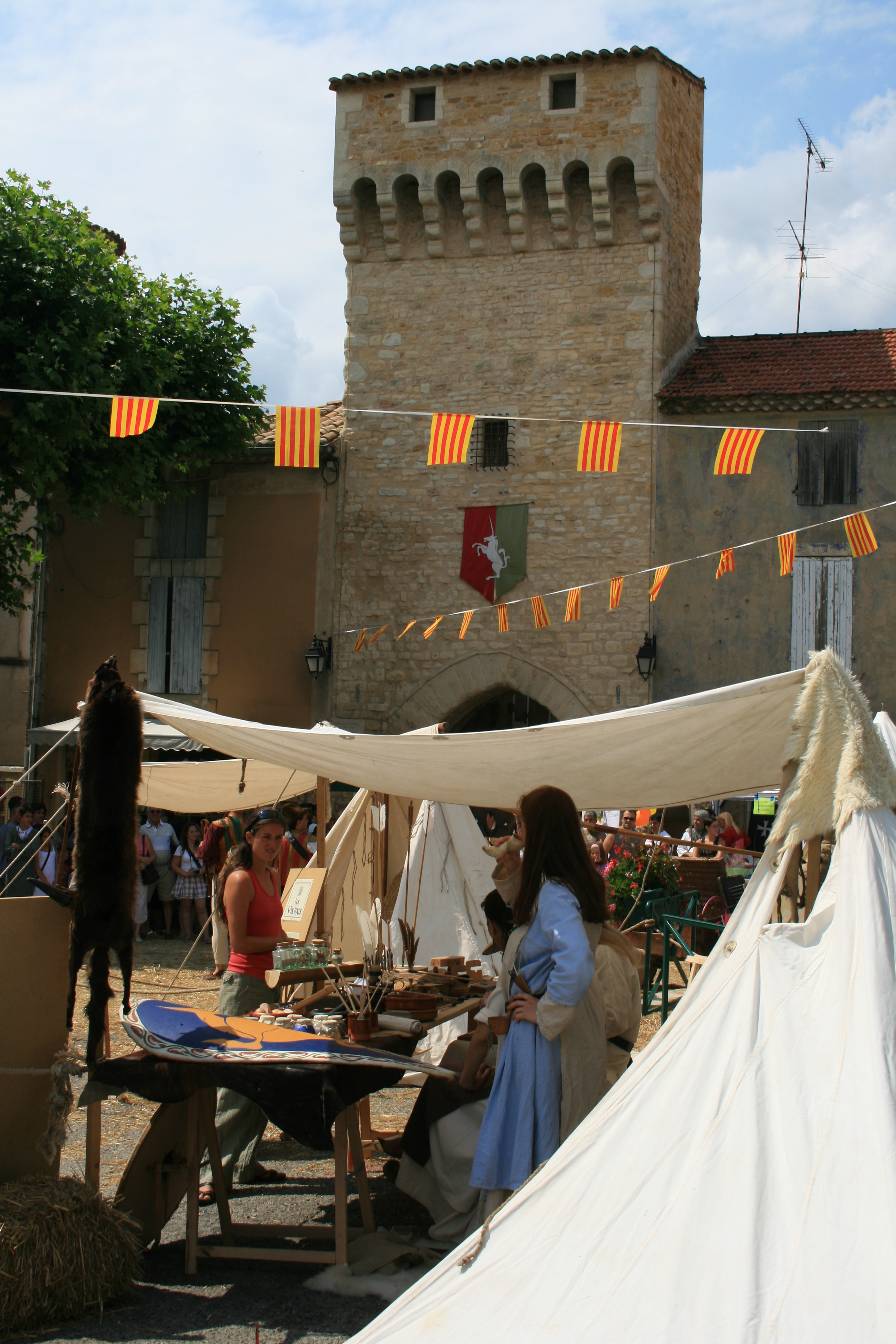 La fête médiévale de Mornas une animation agréable dans le village.